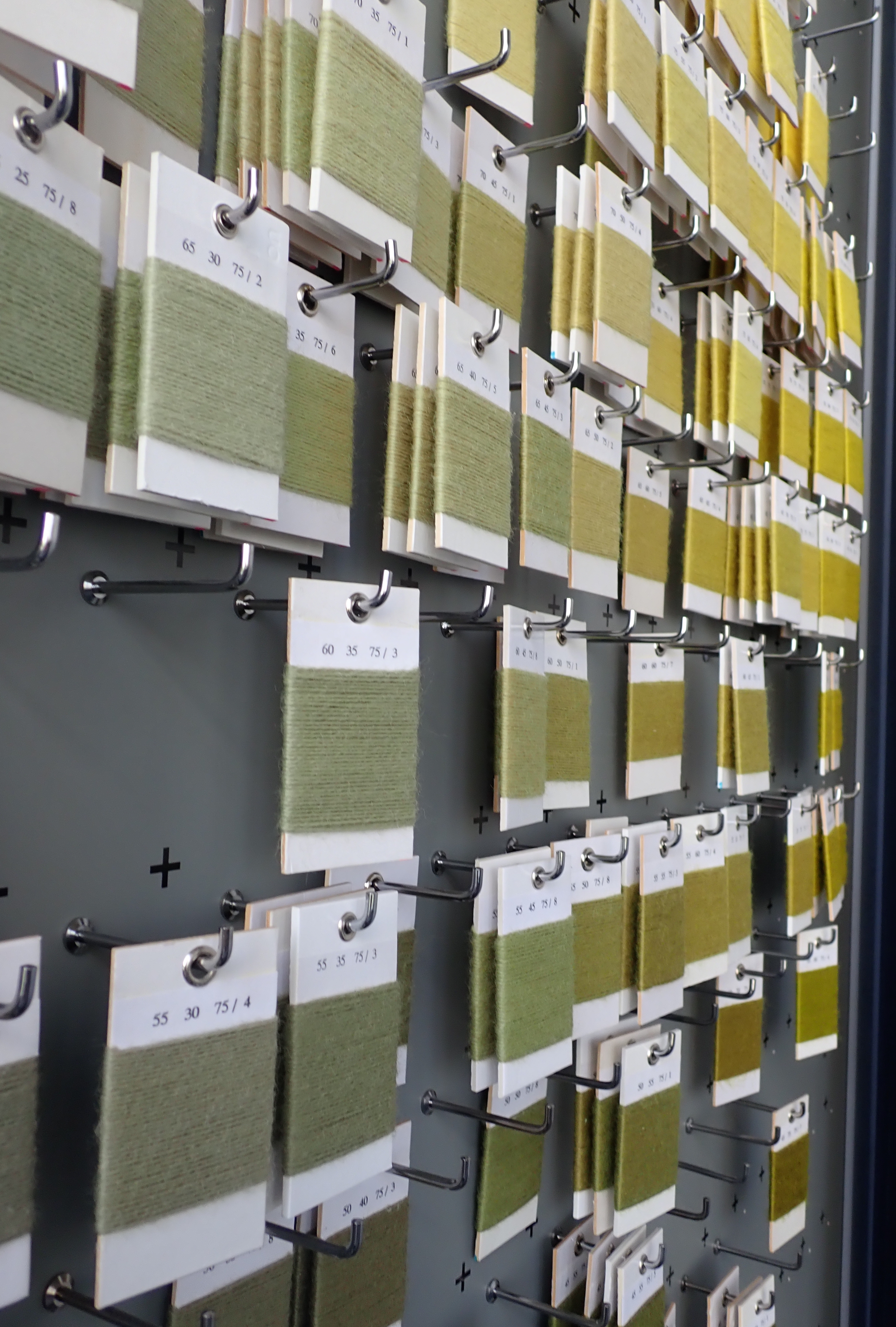 Panneau de tonalité du nuancier des manufactures nationales - Mobilier national (France)